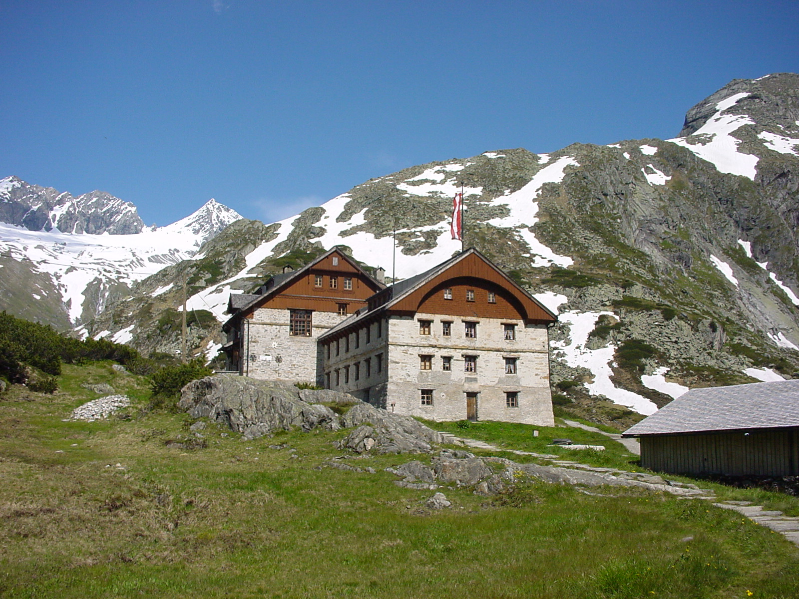 Zillertal, Berliner Hütte (Berlin hut).